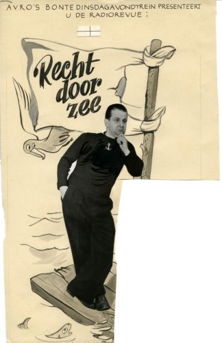 Frans du Mee, uitgeknipt en opgeplakt op een plaat. Hij staat op een vlot met een paal waar een doek aan hangt met er op "recht door zee". Boven op de plaat staat: "Avro´s bonte dinsdagavondtrein presenteer U de radiorevue."